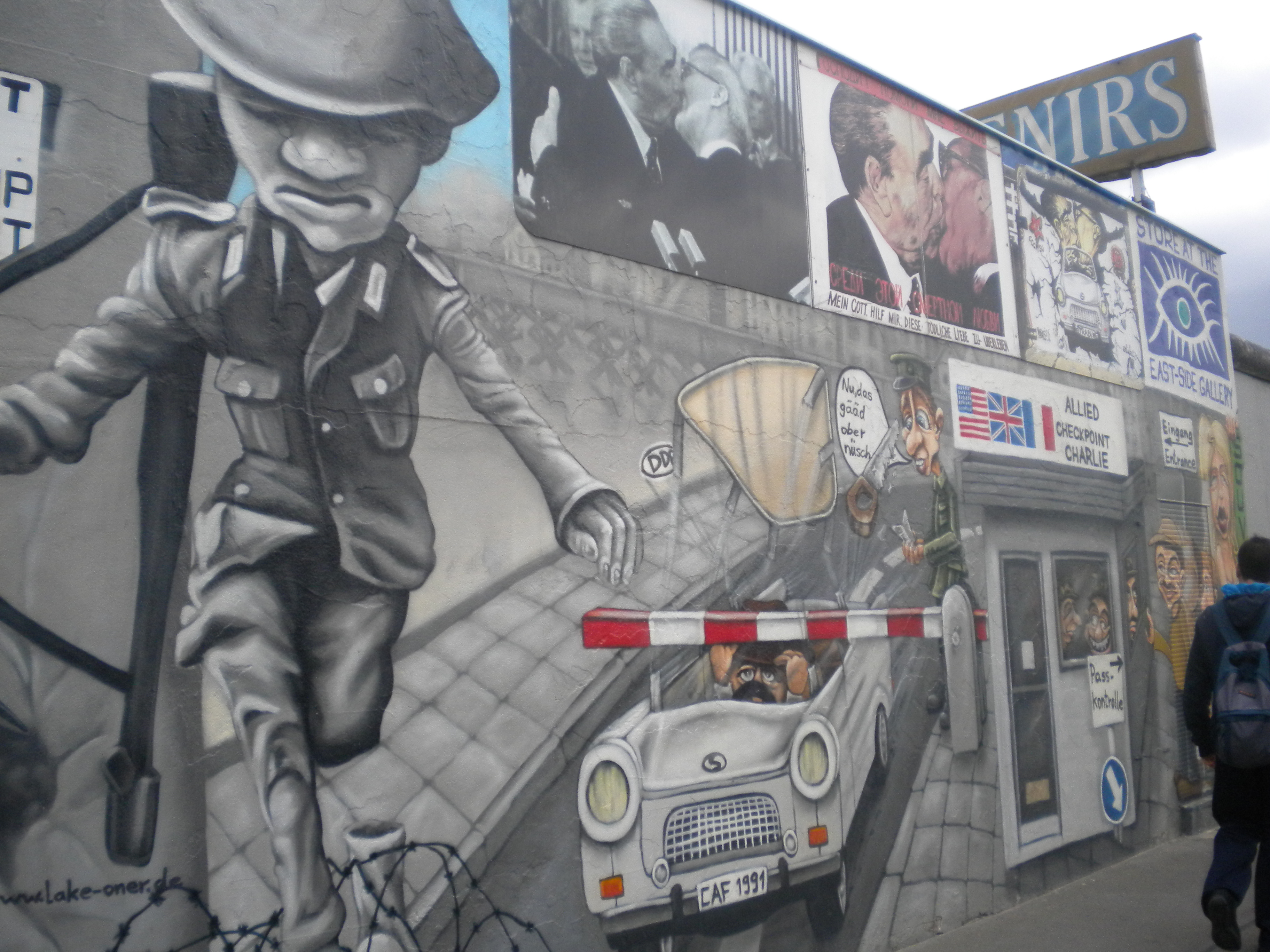 Graffiti Muro de Berlín, Berlín, Alemania